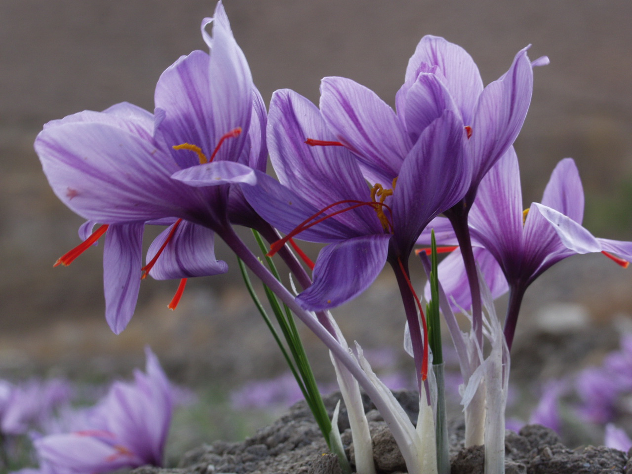 زعفران